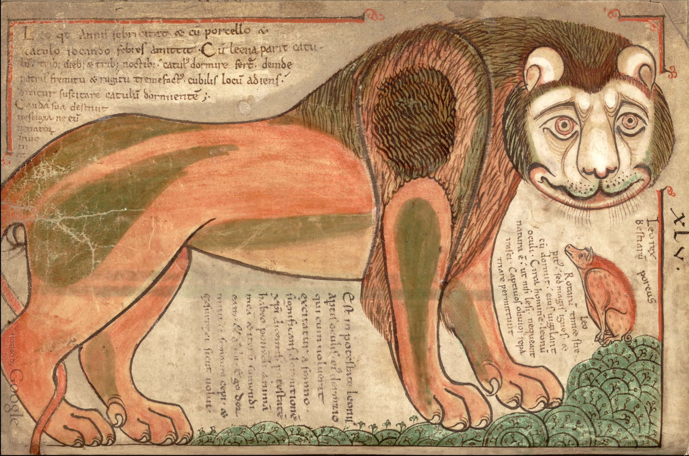 Le lion. Liber Floridus (Ghent University) 1120. (Google Books)